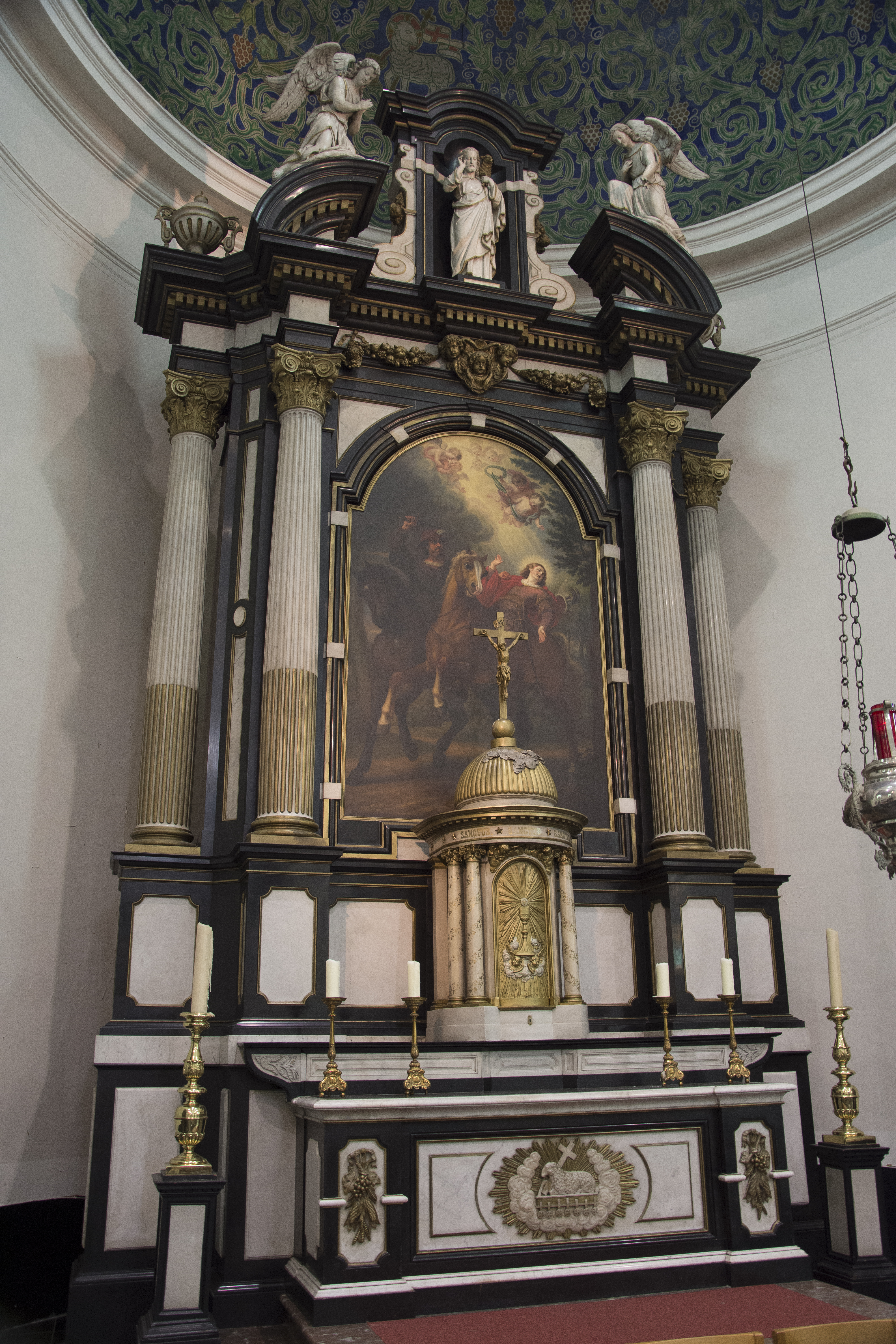 Moord op Gerolf Sint-Gerolfkerk Drongen 16-07-2019 This photo of immovable heritage has been taken in the Flemish Region